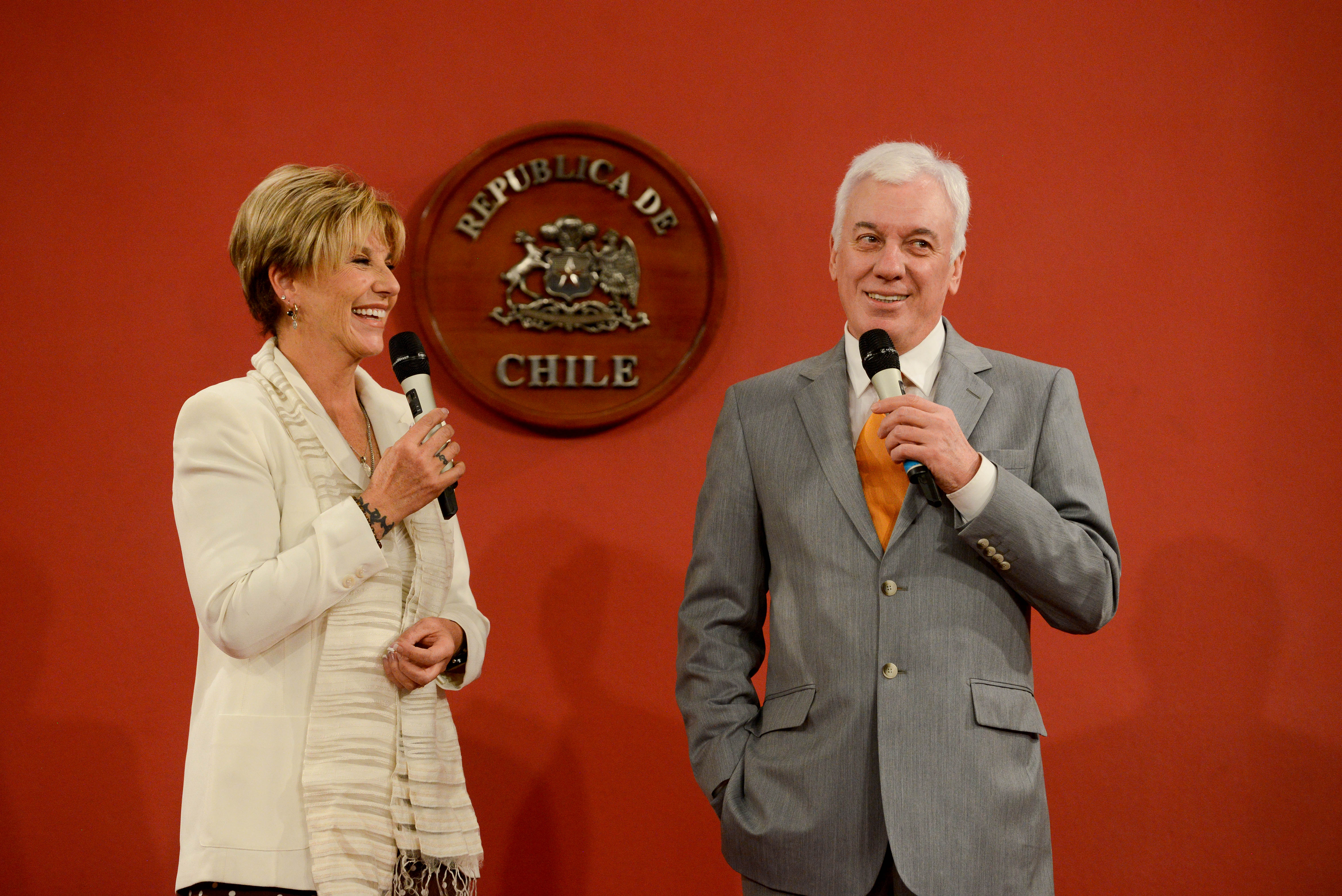 Ministra Cecilia Pérez encabeza la celebración del Día del Locutor